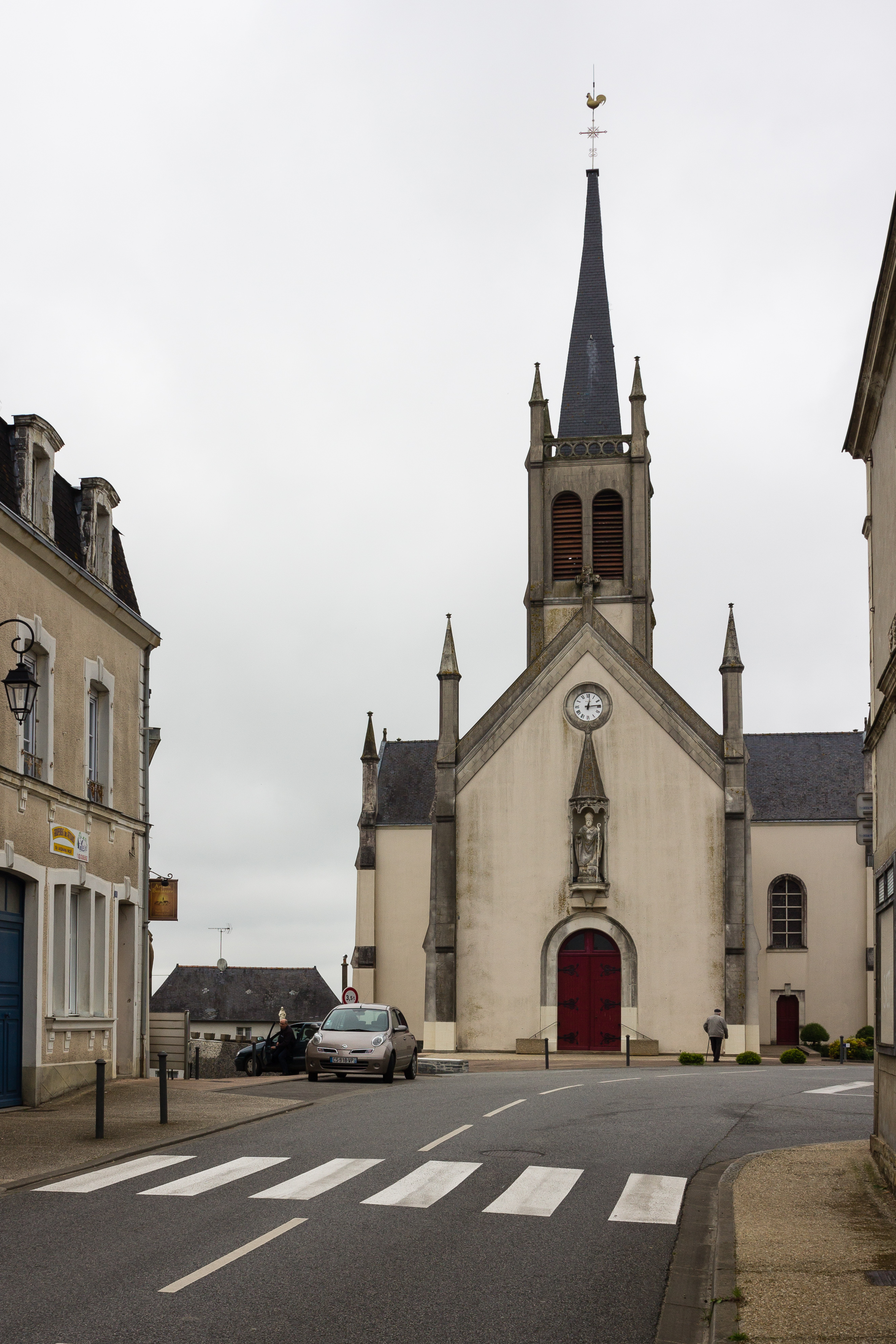 Église Saint-Aignan de Saint-Aignan-sur-Roë (France).